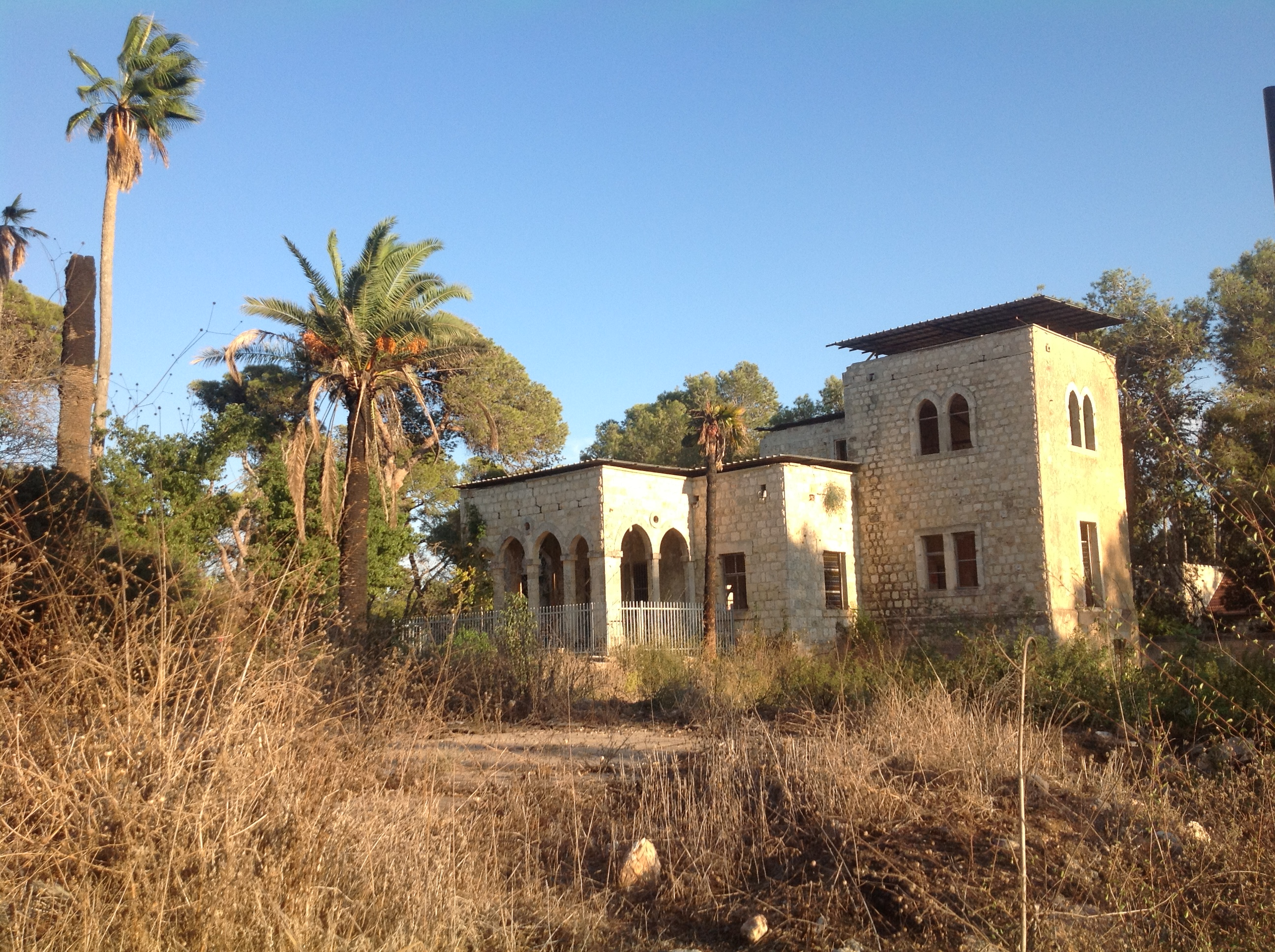 אחוזת לנגה היא בית אחוזה הממוקם במרכז זכרון יעקב. בית האחוזה, הנמצא כיום נטוש במרכז גן גדול ומוזנח, נבנה בתחילת המאה ה-20 על ידי הזוג ניטה (בנטוויץ') ומיכאל לנגה. בזמן מלחמת העולם הראשונה שימש הבית כמרכז תרבות לקצינים טורקים וגרמנים.